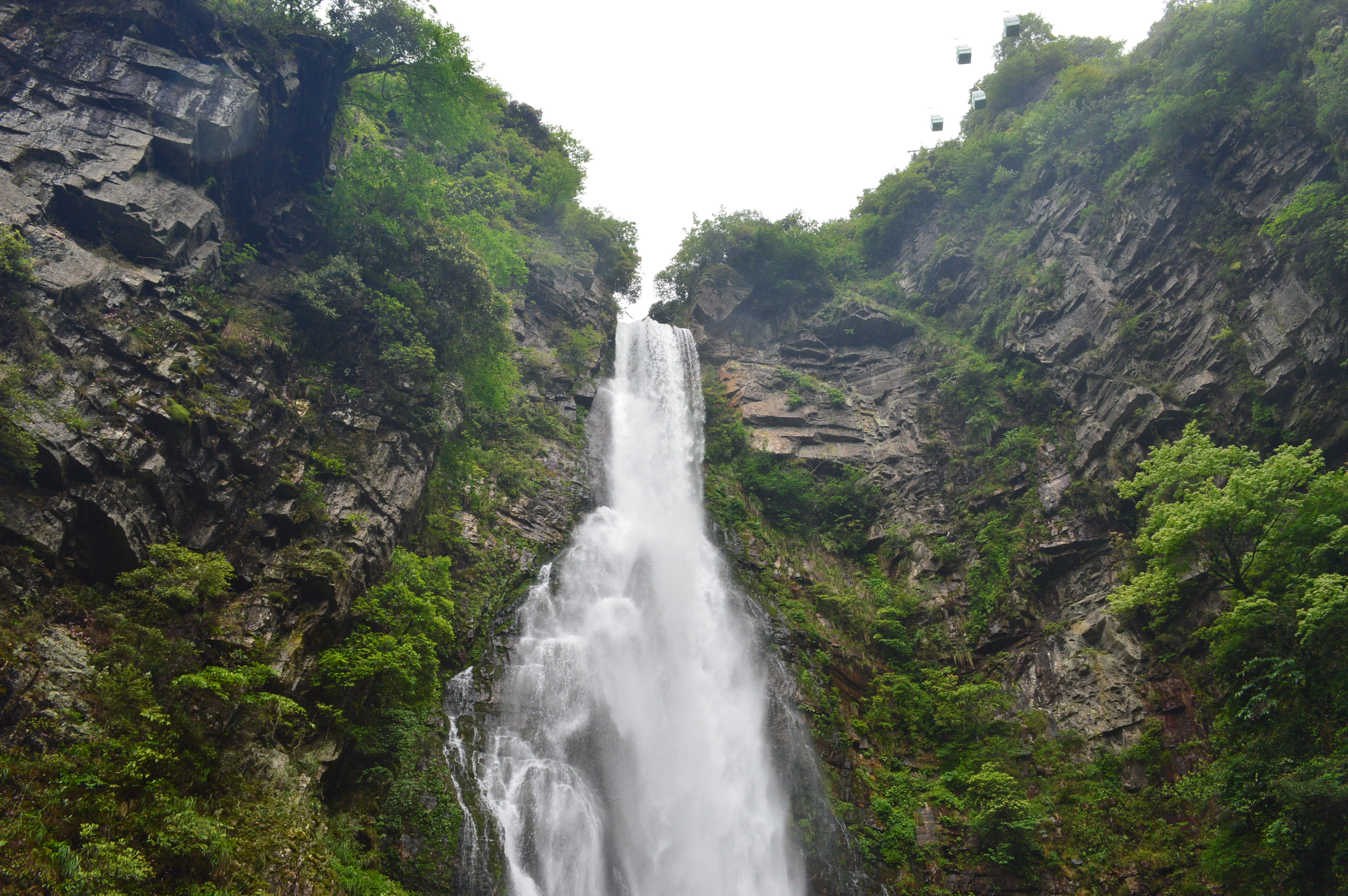 照片摄于井冈山国家级自然保护区茨坪镇北面七公里处的龙潭瀑布群之第四潭。其名飞凤潭，潭上有飞凤瀑古名黑龙瀑，瀑水从数米高的山崖上急流直下，如凤凰展翅，飞入潭中。